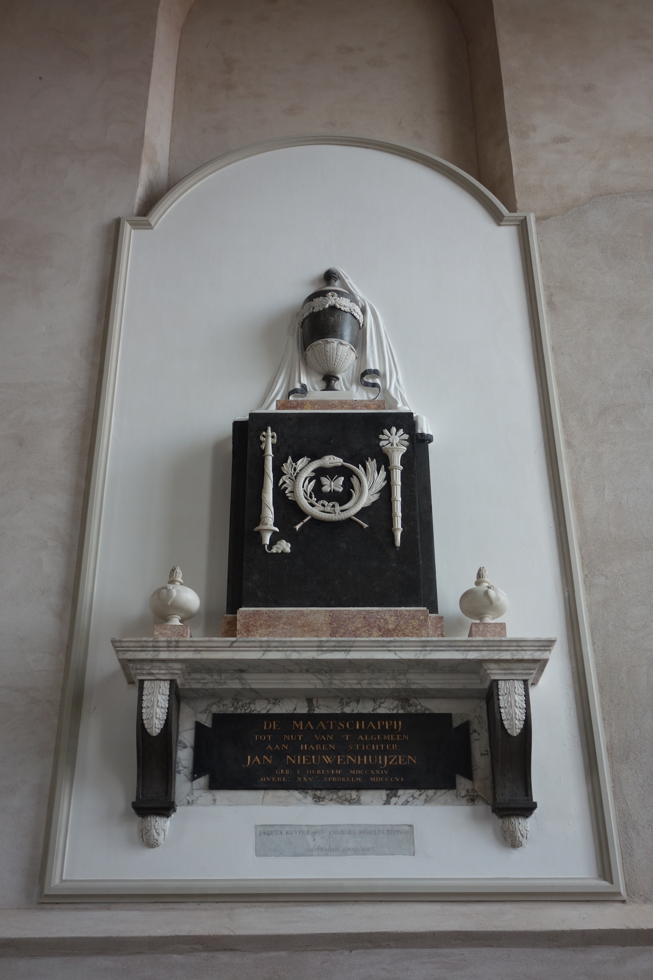 Epitaaf in een geblindeerd venster aan de voorgevel van de Grote of Sint-Nicolaaskerk in Monnickendam. Het epitaaf is voor Jan Nieuwenhuijzen (1 september 1724 - 25 februari 1806), hij was oprichter van de Maatschappij tot nut van 't algemeen. Het monument is ontworpen door Jaques Kuijper en gemaakt door Charles Sigault.